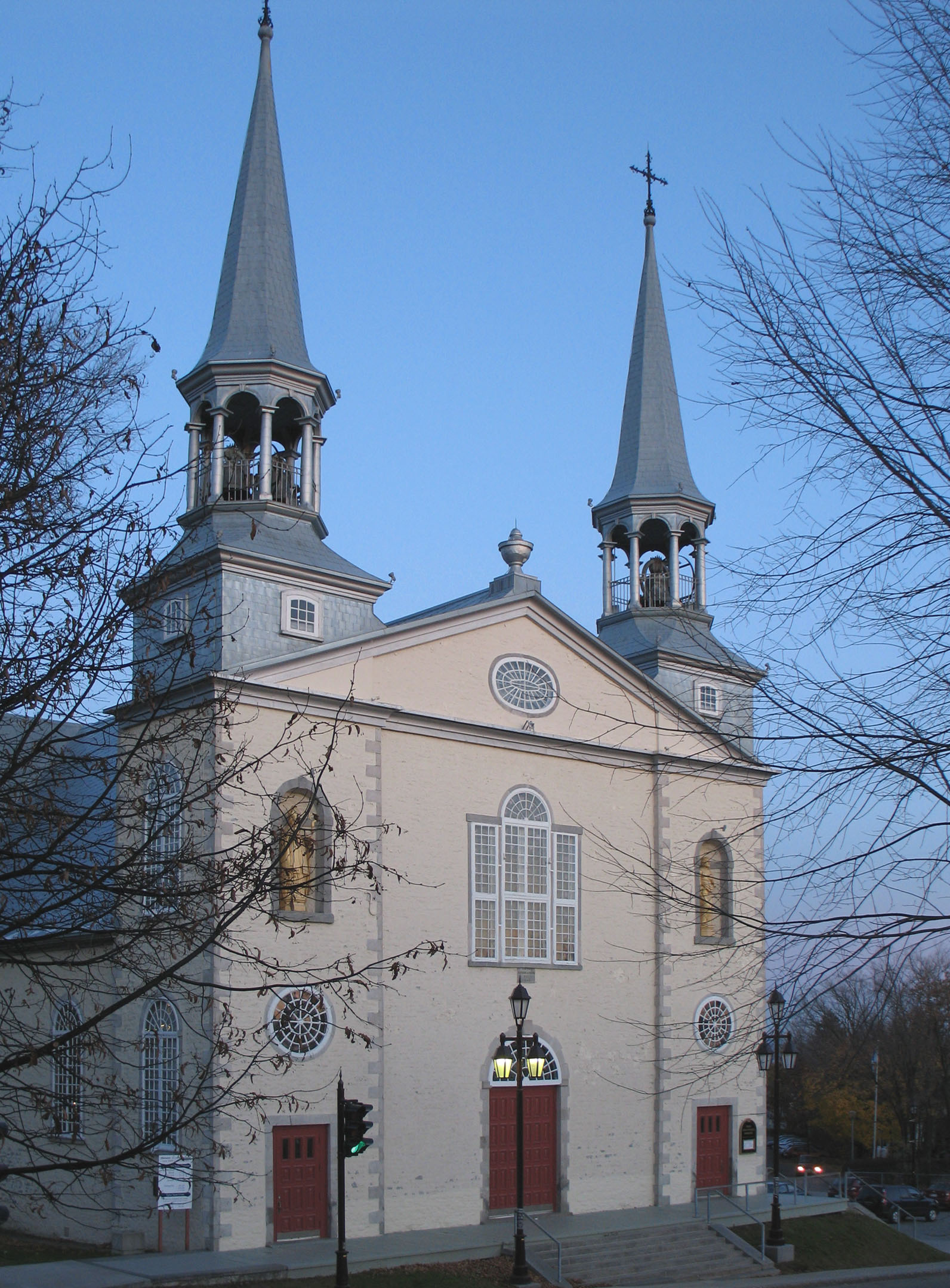 Église Saint-Charles-Borromée dans l'Arrondissement historique de Charlesbourg, ville de Québec, province de Québec, Canada. Église classée monument historique en 1959.